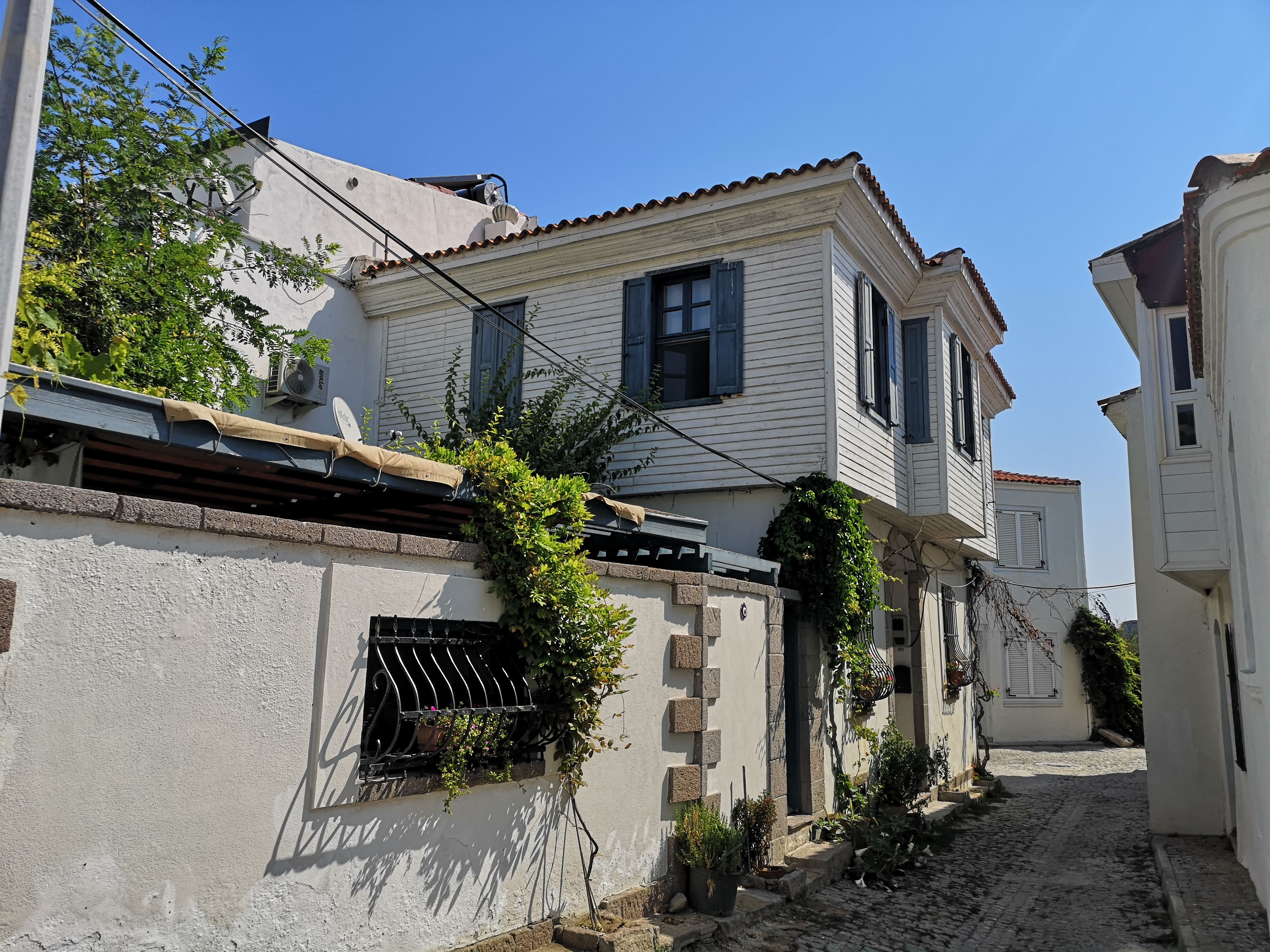 Bozcaada, Çanakkale, 2019